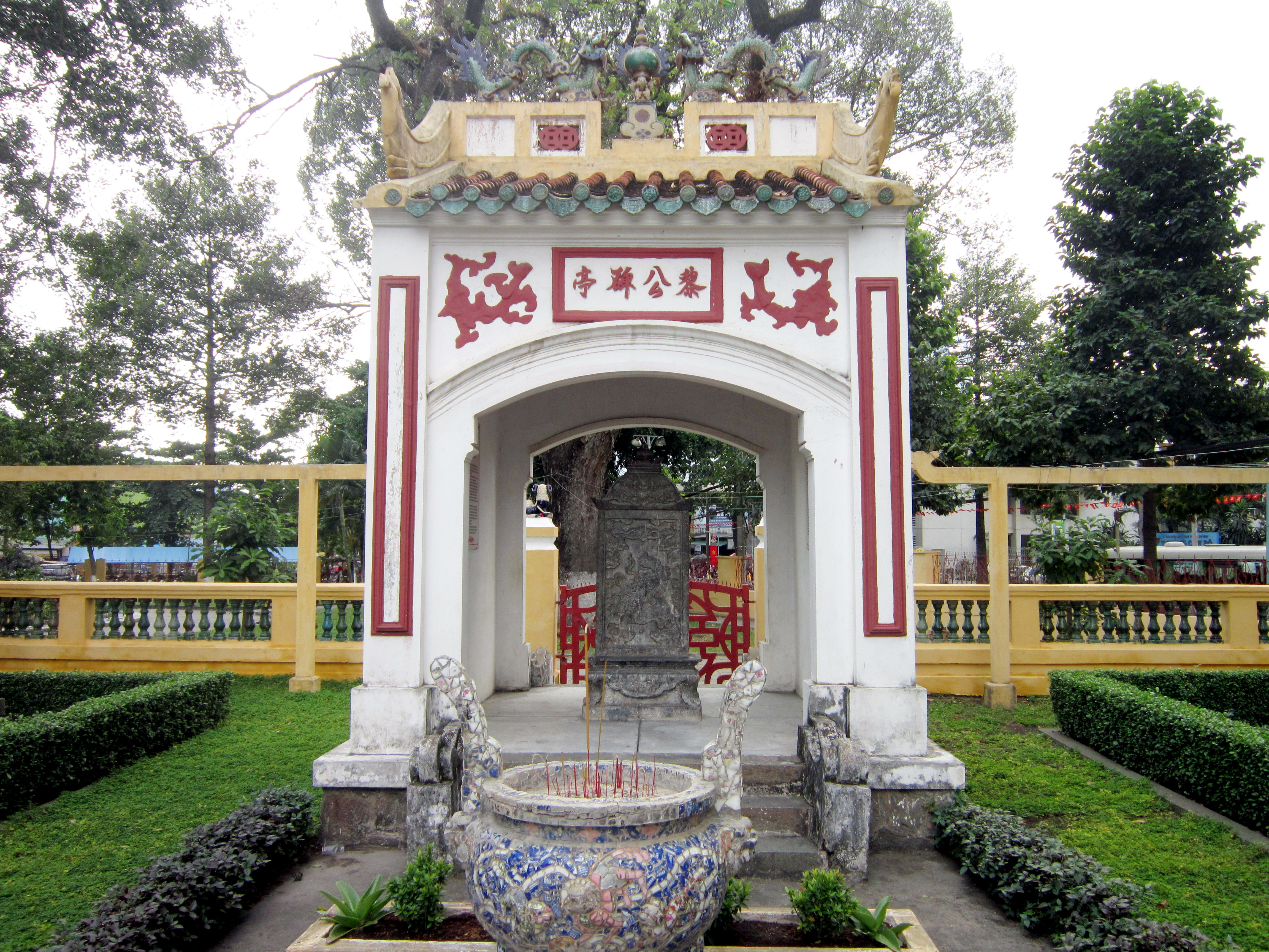 Nhà bia trong khuôn viên Lăng Ông Bà Chiểu (tức khu đền và mộ tướng Lê Văn Duyệt) ở quận Bình Thạnh, TP. Hồ Chí Minh, Việt Nam.